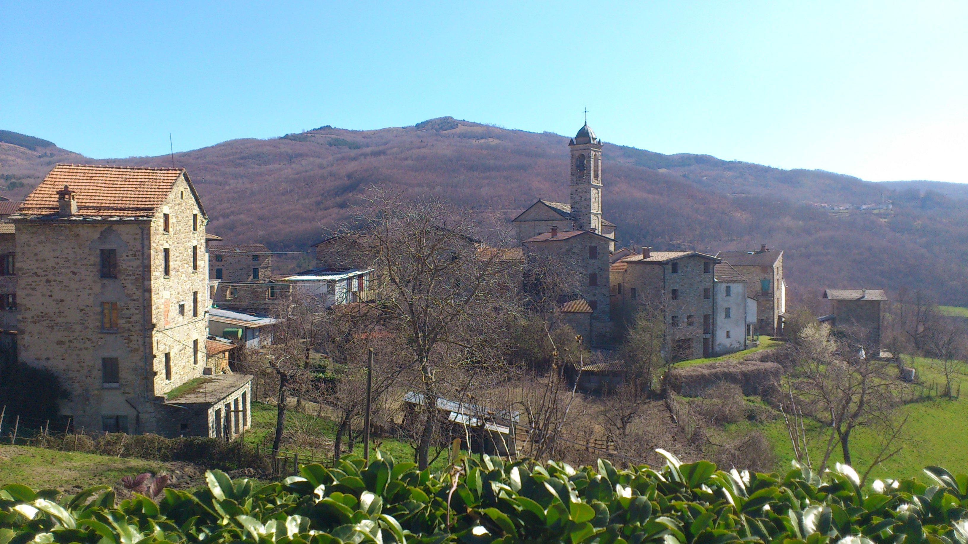 Veduta della frazione di Castelcanafurone